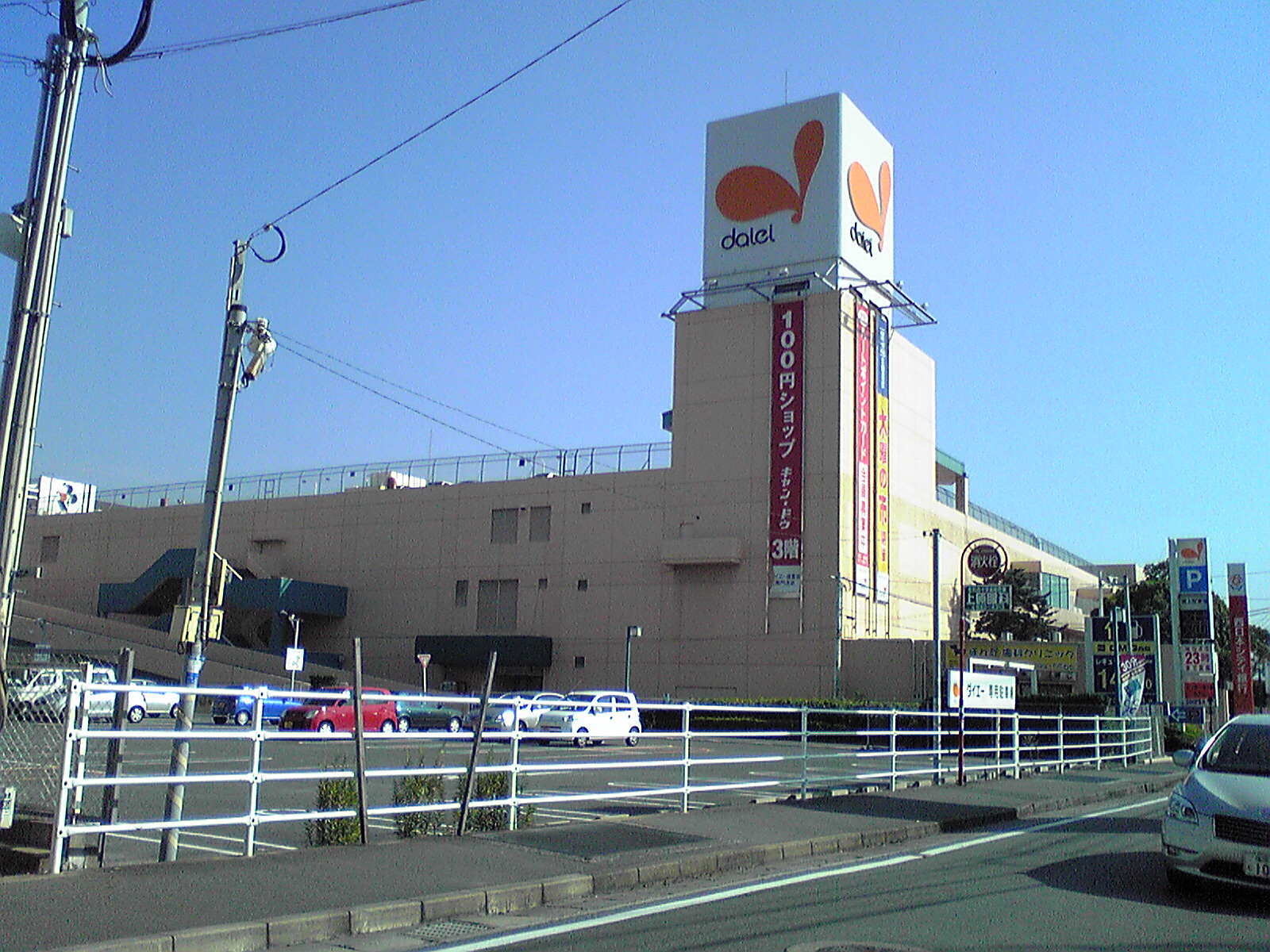 福岡市西区にあるダイエー福重店（旧ユニード・福重アピロス）